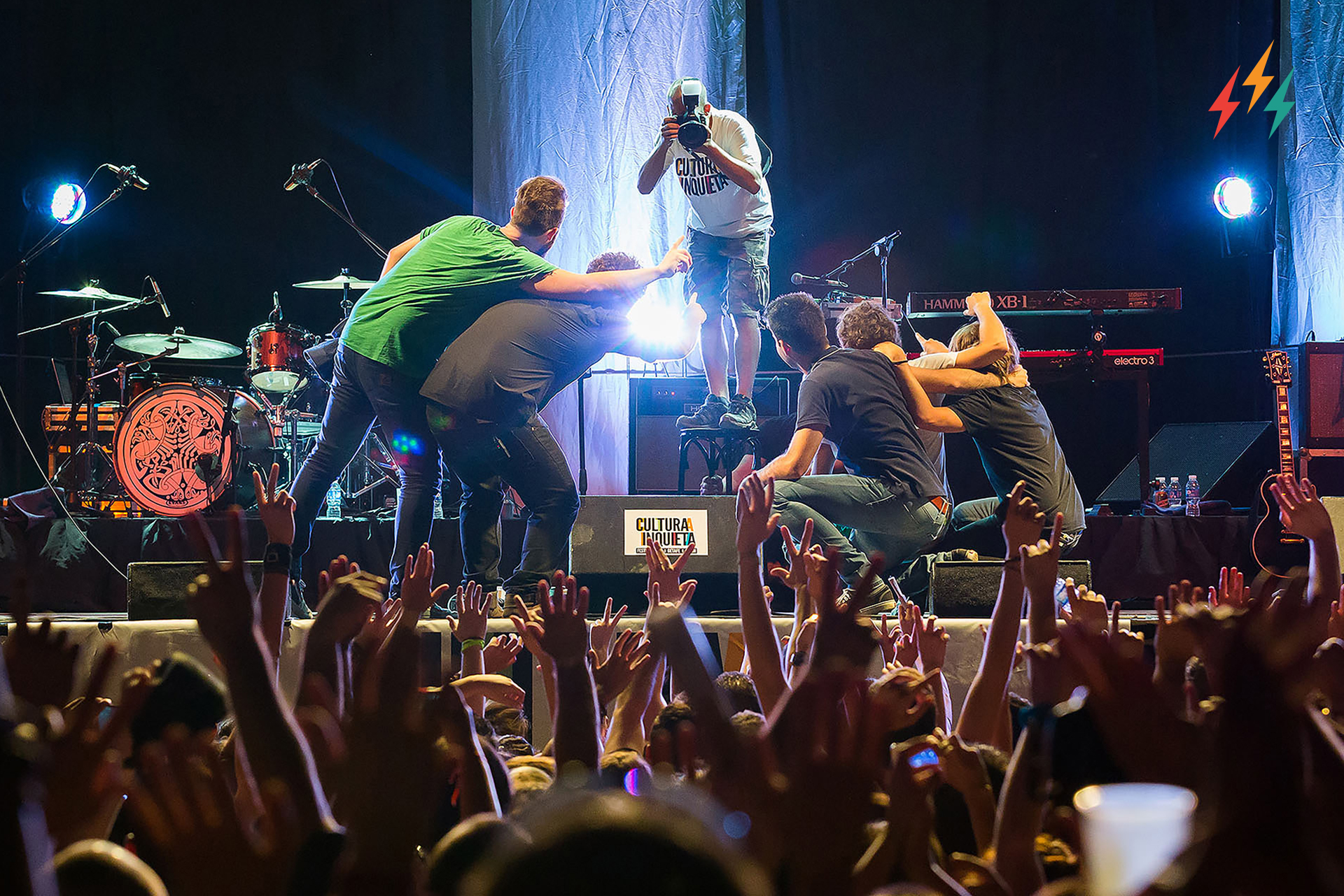 Concierto de Supersubmarina en el Festival Cultura Inquieta